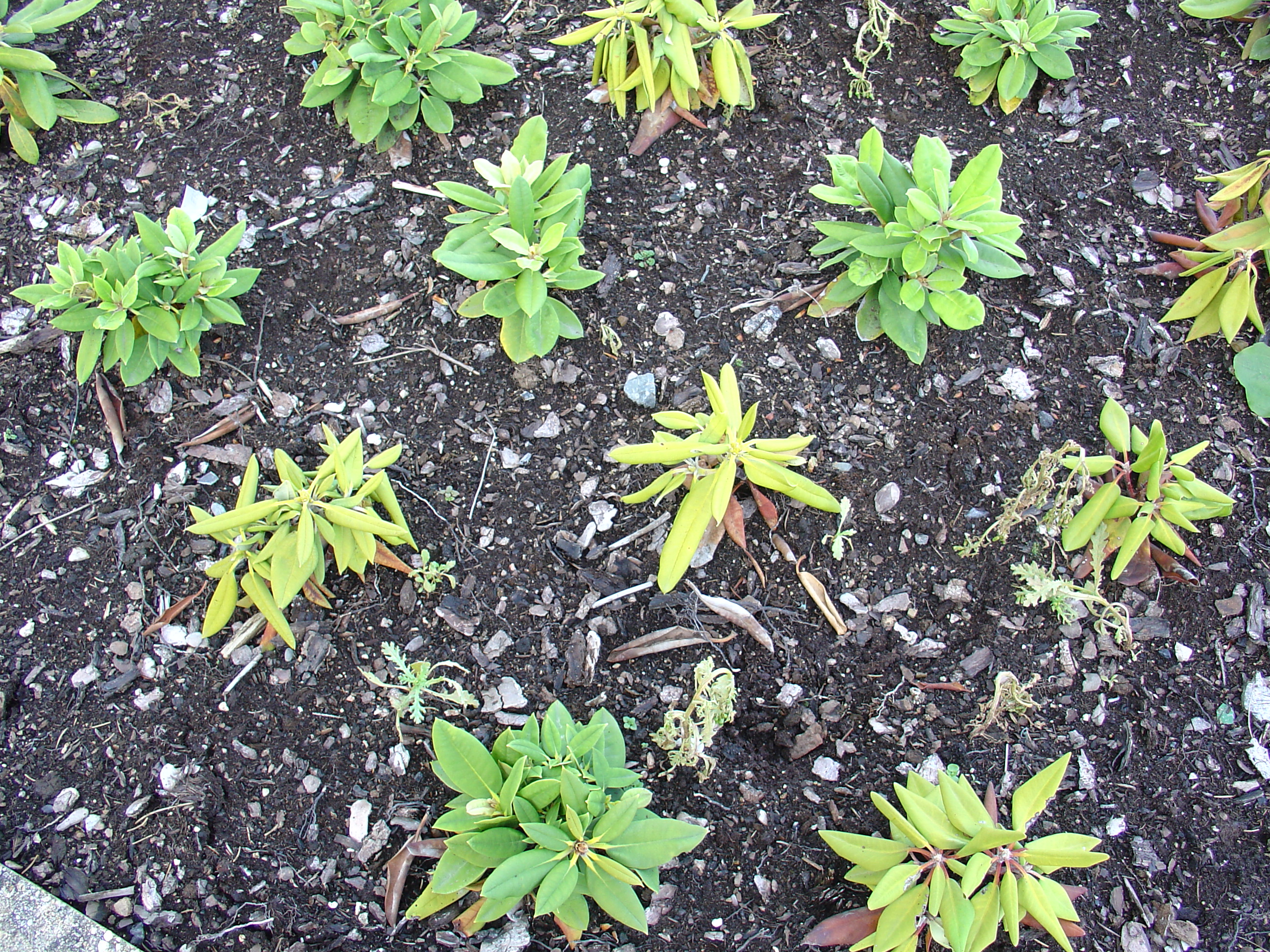 Rhododendron root rot caused by P. cinnamomi, central Bohemia, 2003 (photo M. Mrázková, Karel Černý)